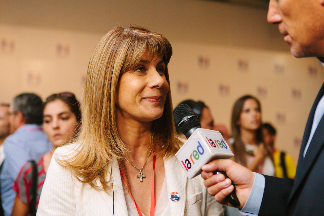 Elecciones 2013 desde el hotel Plaza San Francisco 15/12/2013